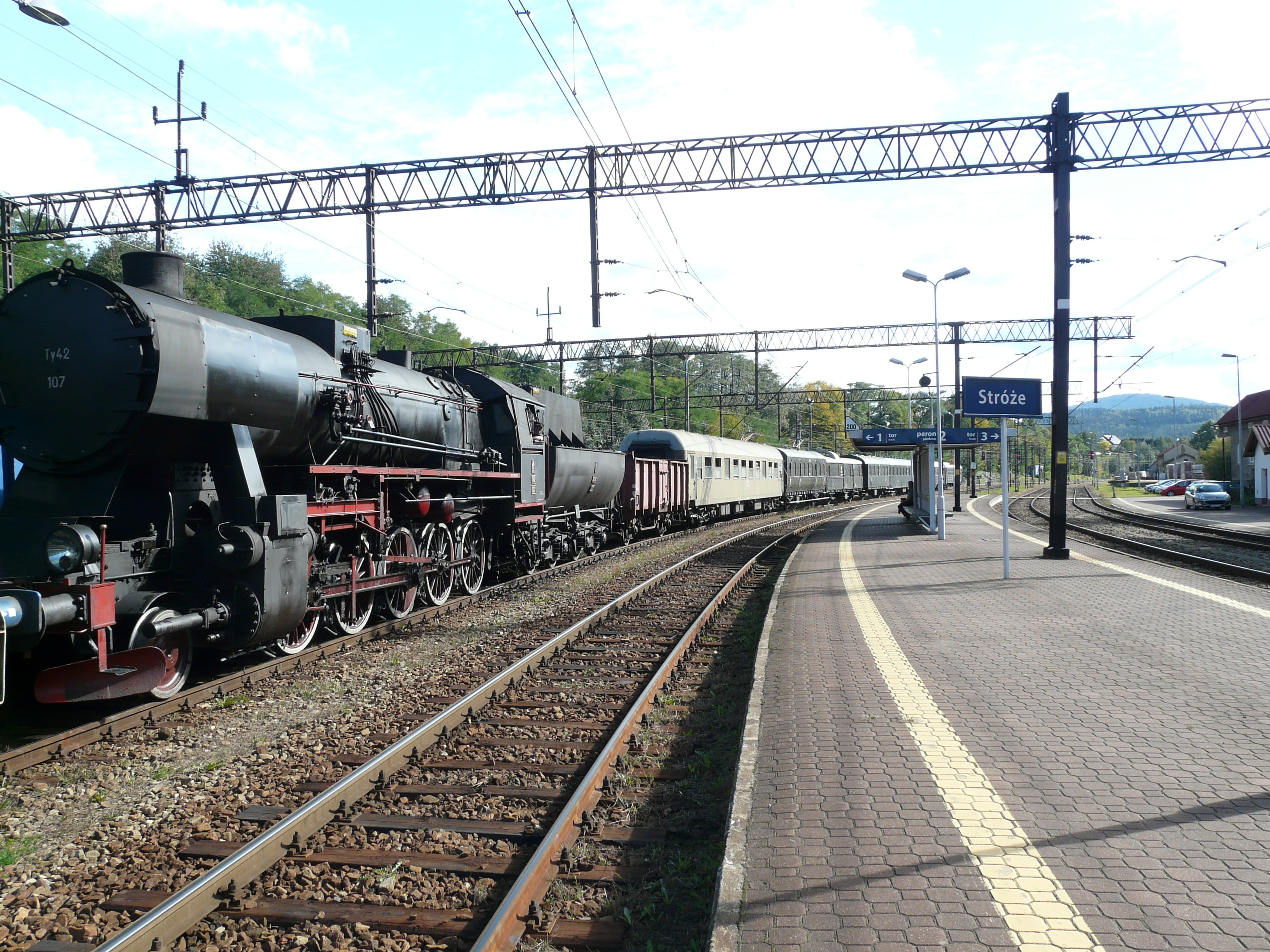 Ty42-107 z wagonami w Stróżach w drodze na trasę z Tarnowa do Żabna w ramach projektu Małopolskie Szlaki Turystyki Kolejowej